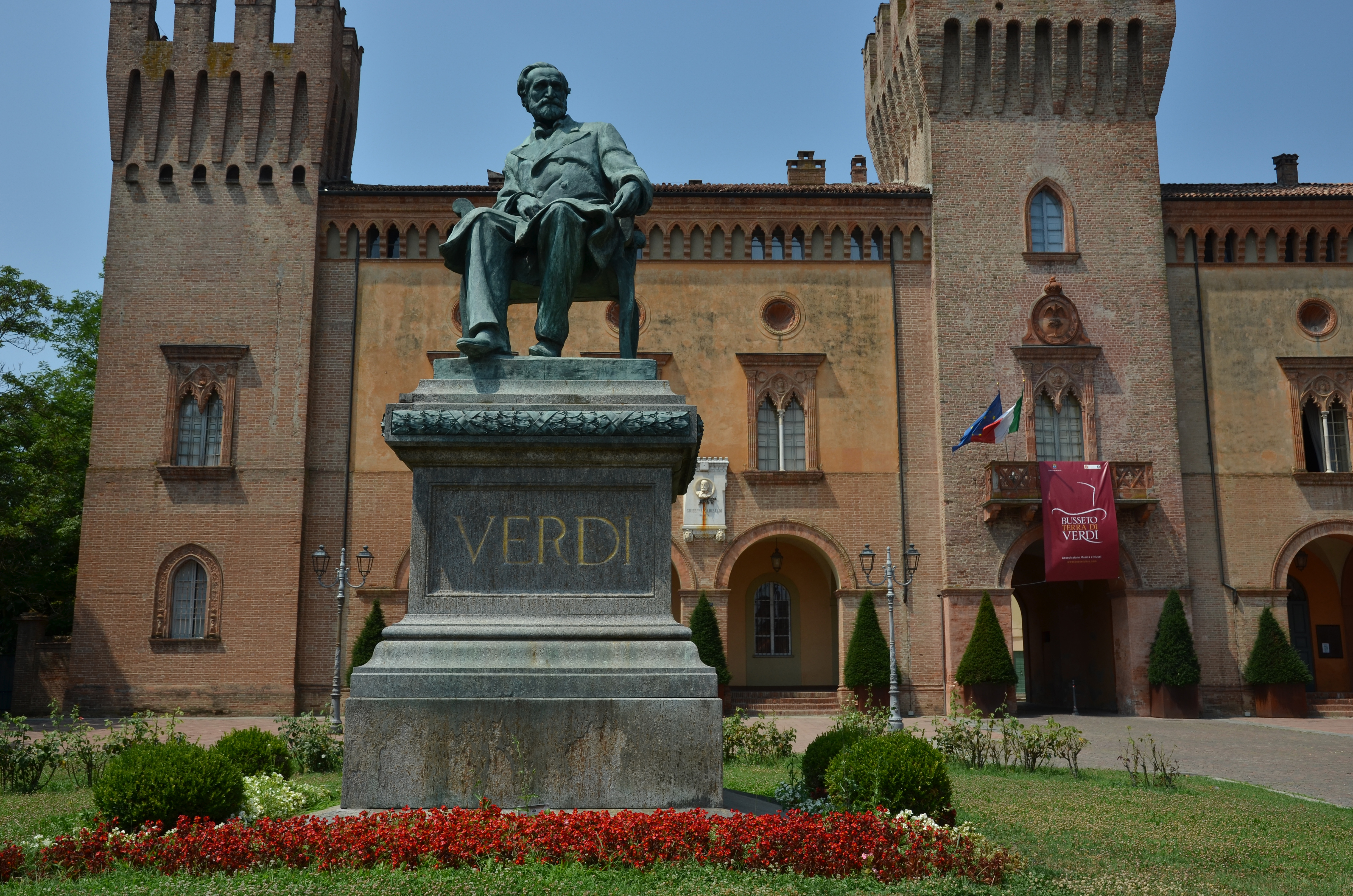 Busseto, Itálie